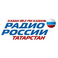 Татарча/tatarça: 2020 елның гыйнварында Татарстан радиосының яңа сайты төзелде һәм логотибы алмаштырылды